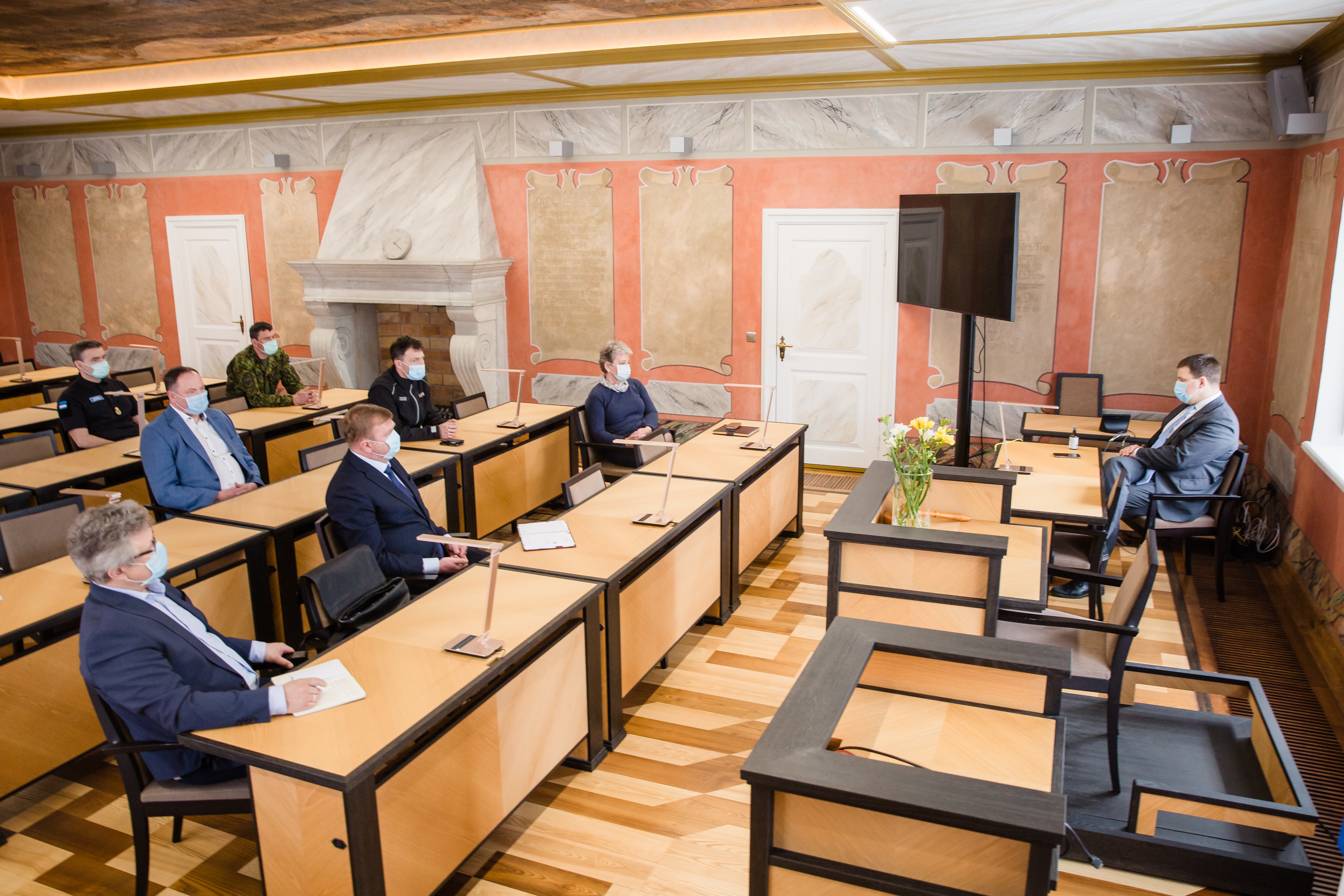 Jüri Ratase Muhu- ja Saaremaa visiit mais 2020.